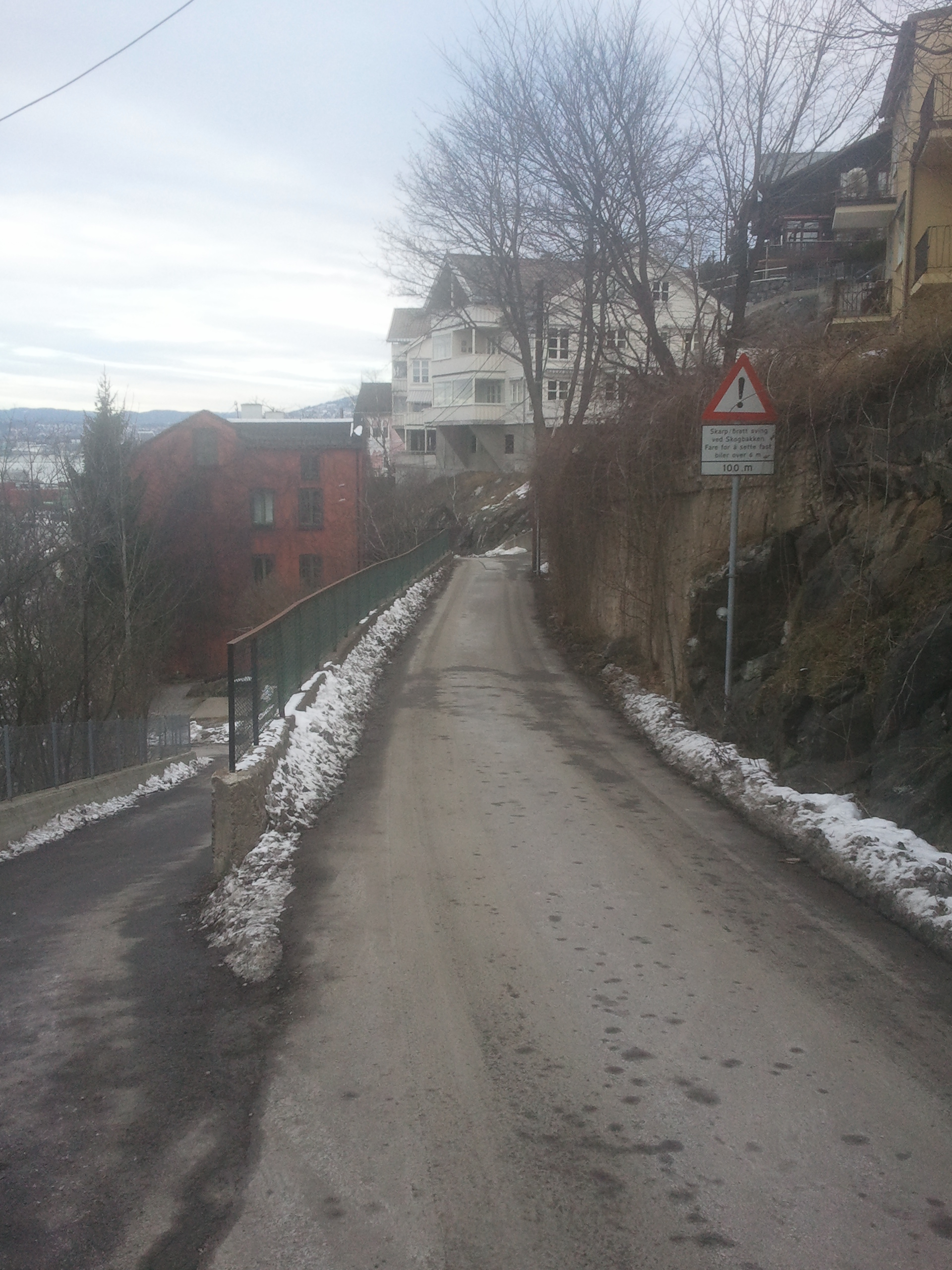 Bekkelagsveien ved Bjerringbakken (til venstre)